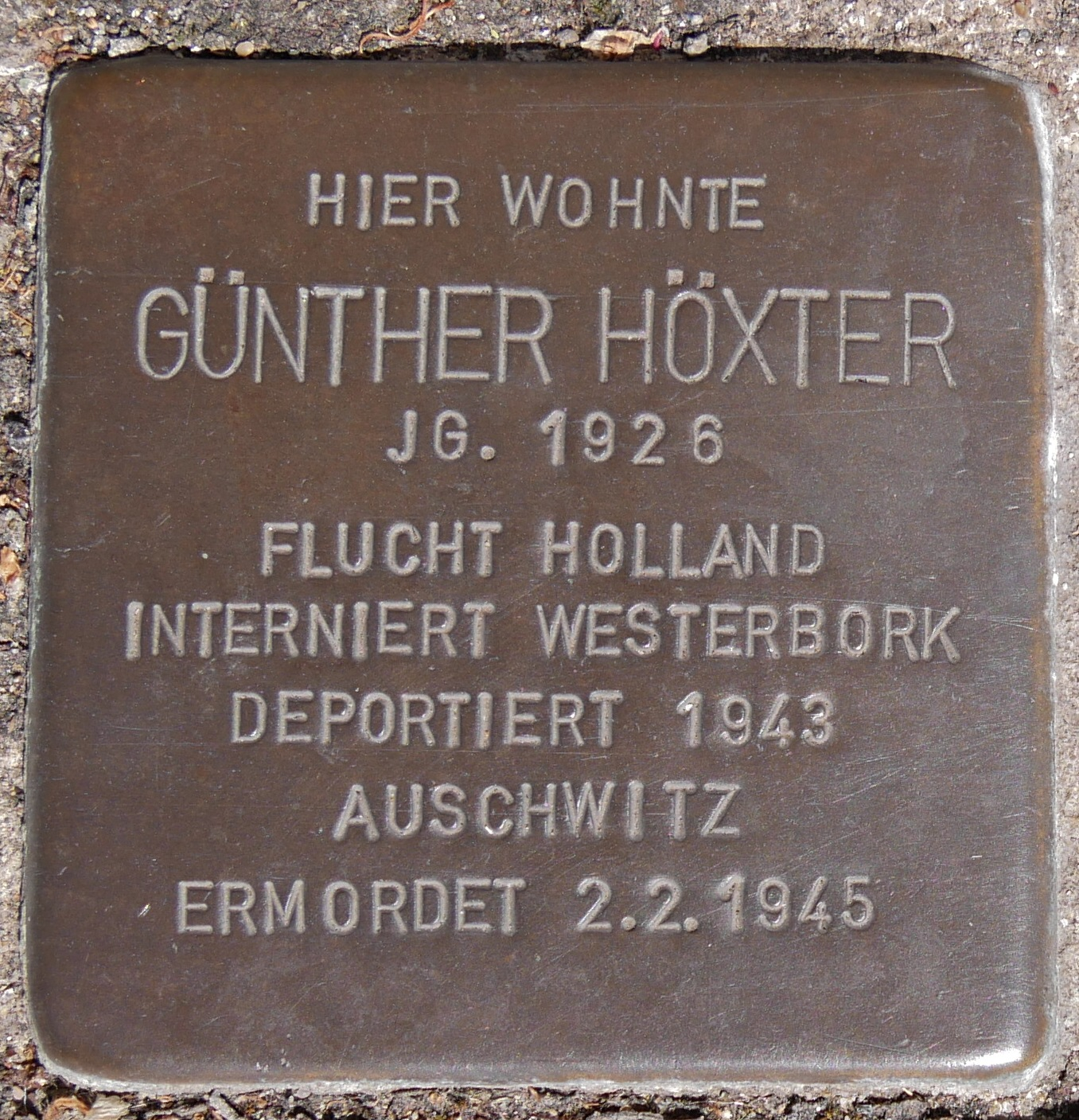 Stolpersteine Wesel: Höxter, Günther